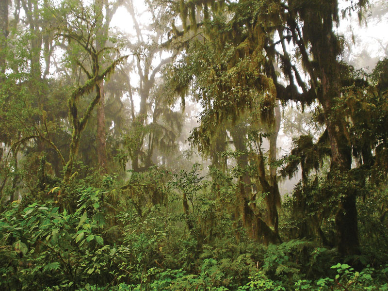 Bosque Nublado camino a San Andrés, Provincia de Salta.